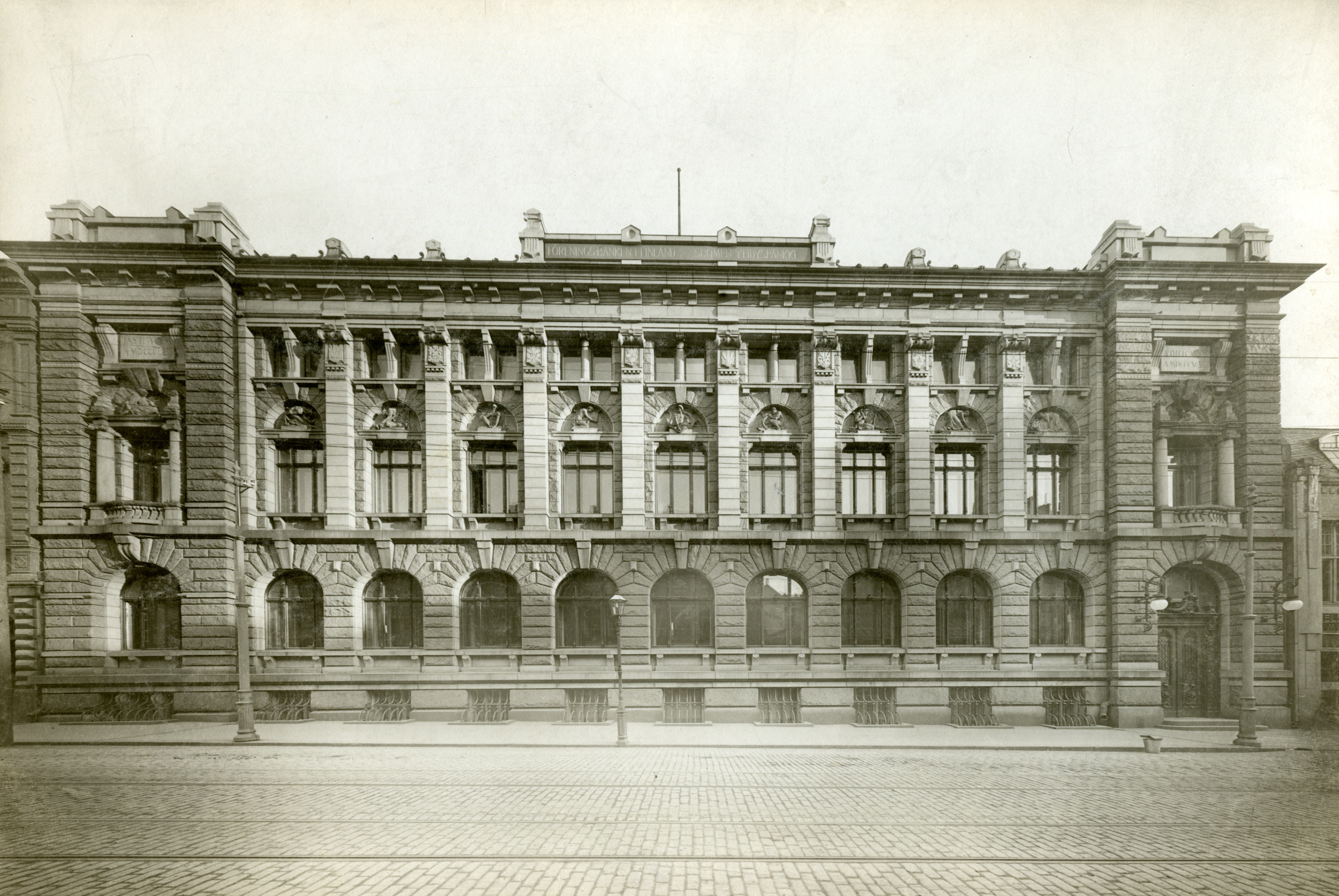 Suomen Yhdyspankin ensimmäinen oma toimitalo osoitteessa Aleksanterinkatu 36 B Helsinki. Rakennus valmistui vuonna 1898 ja sen piirsi arkkitehti professori Gustaf Nyström.